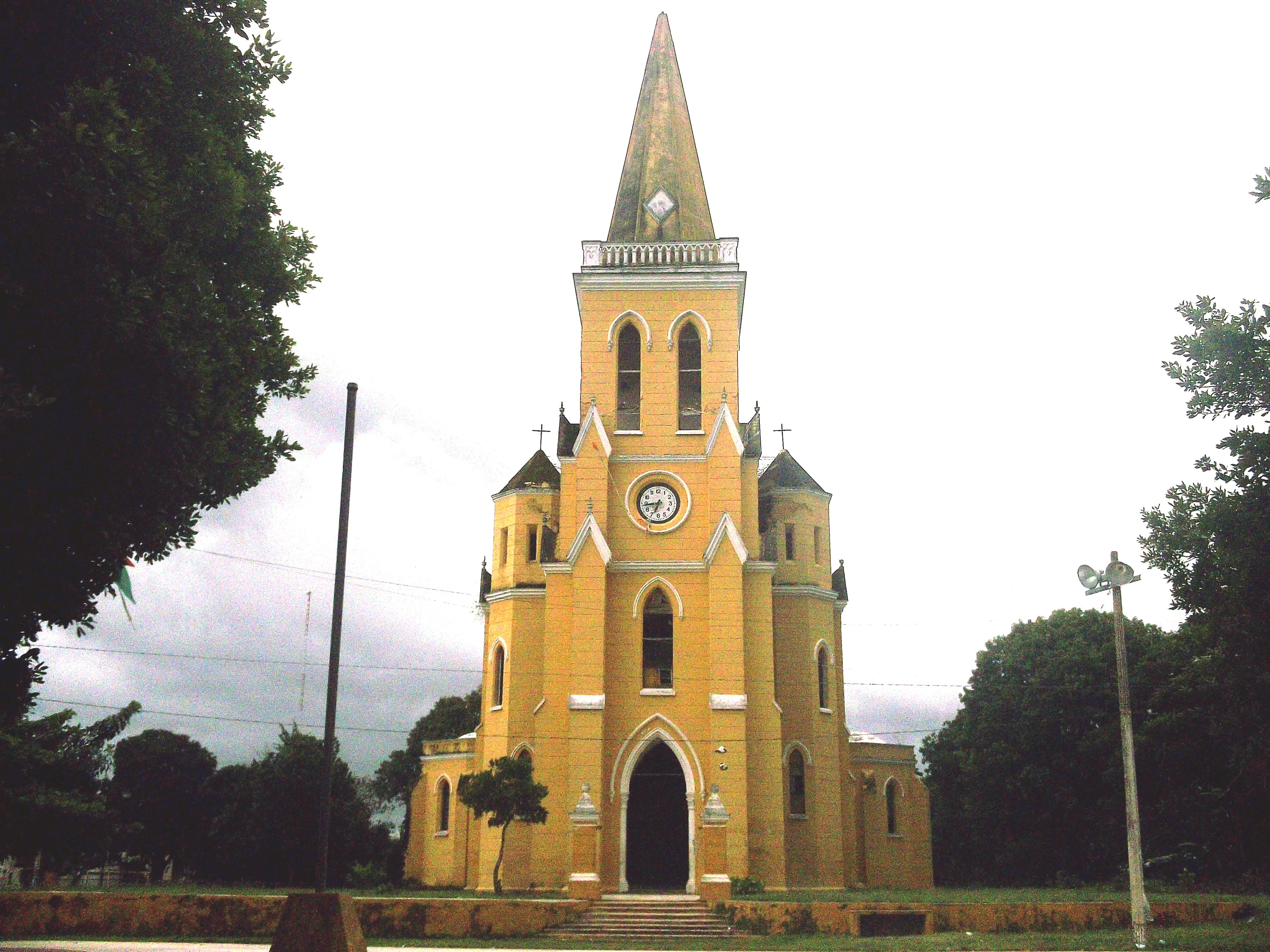 Iglesia de Eknakán, Yucatán.